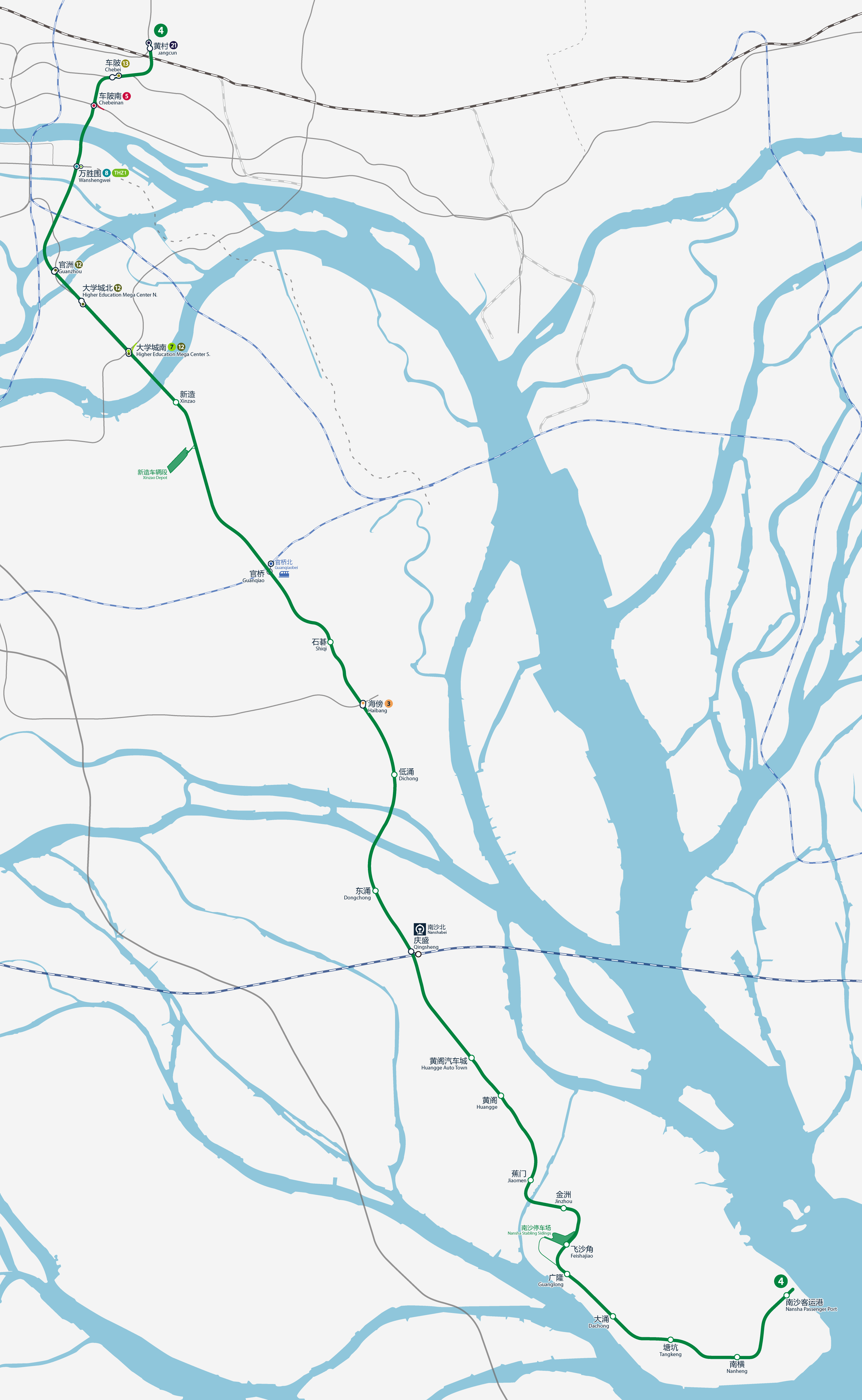 廣州地鐵4號線及4號線南延段路線圖，按真實走向比例繪畫